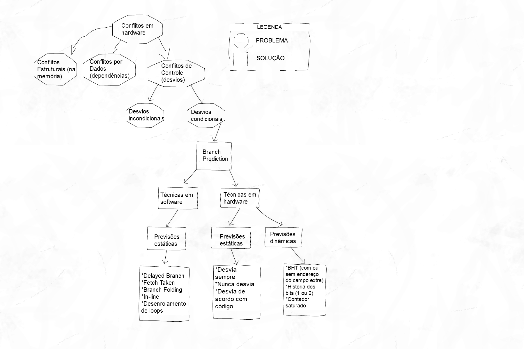 mostra as subdivisões de conflitos de controle em arquiteturas pipeline